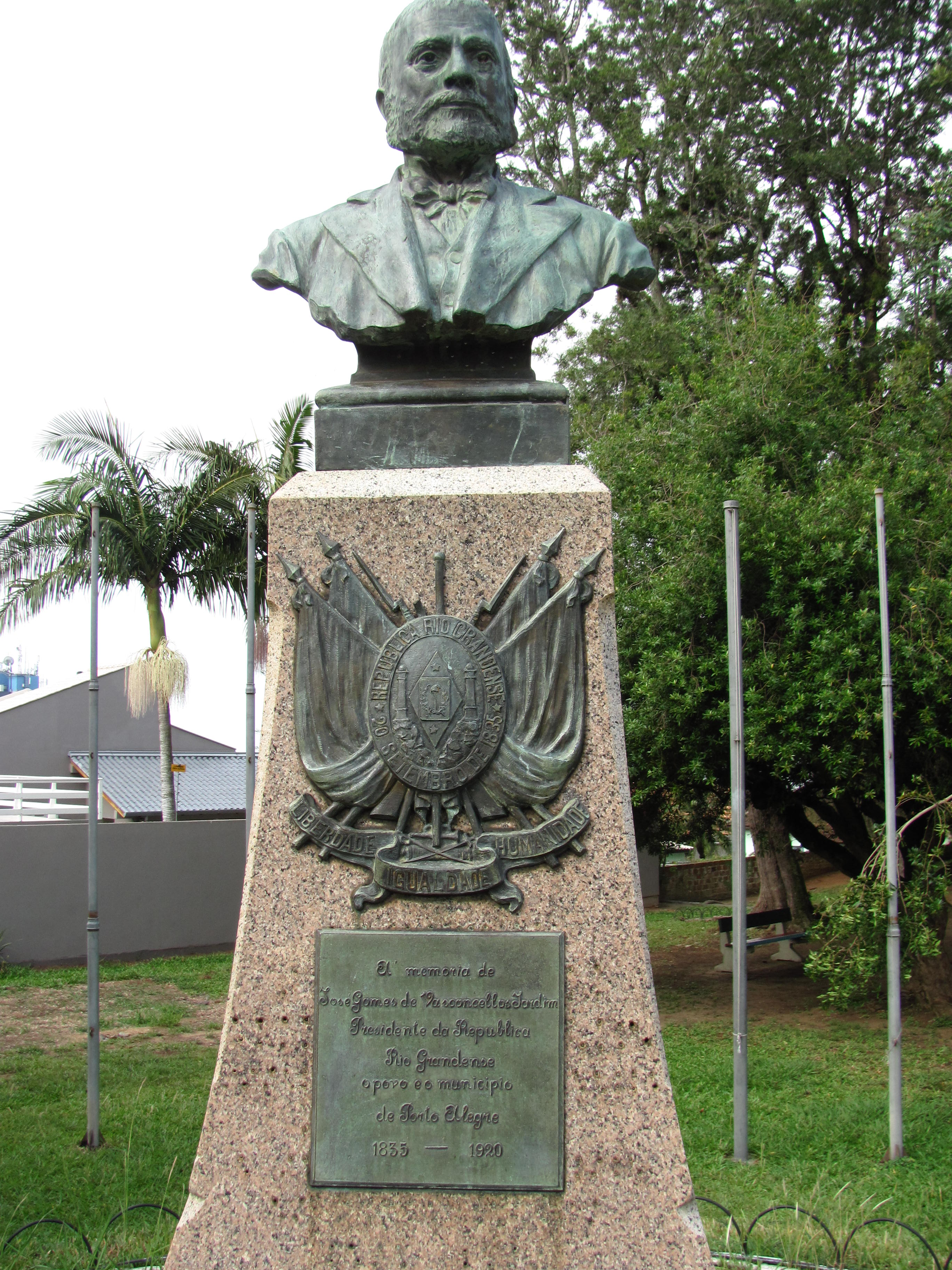 Jose Gomes de Vasconcellos Jardim, Presidente da República Riograndense